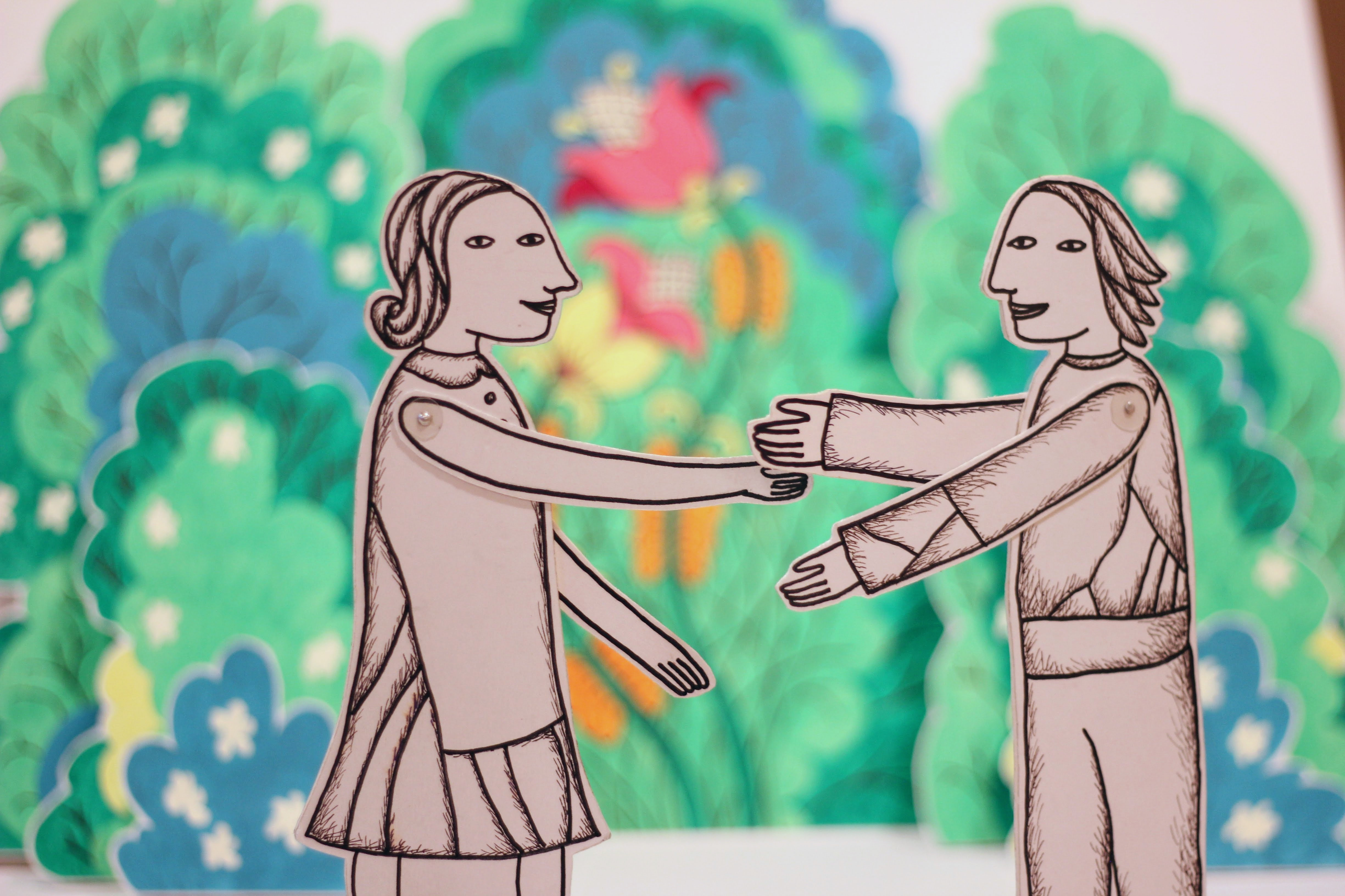 Декорации из спектакля "Снежная Королева" театра "Студии Т"